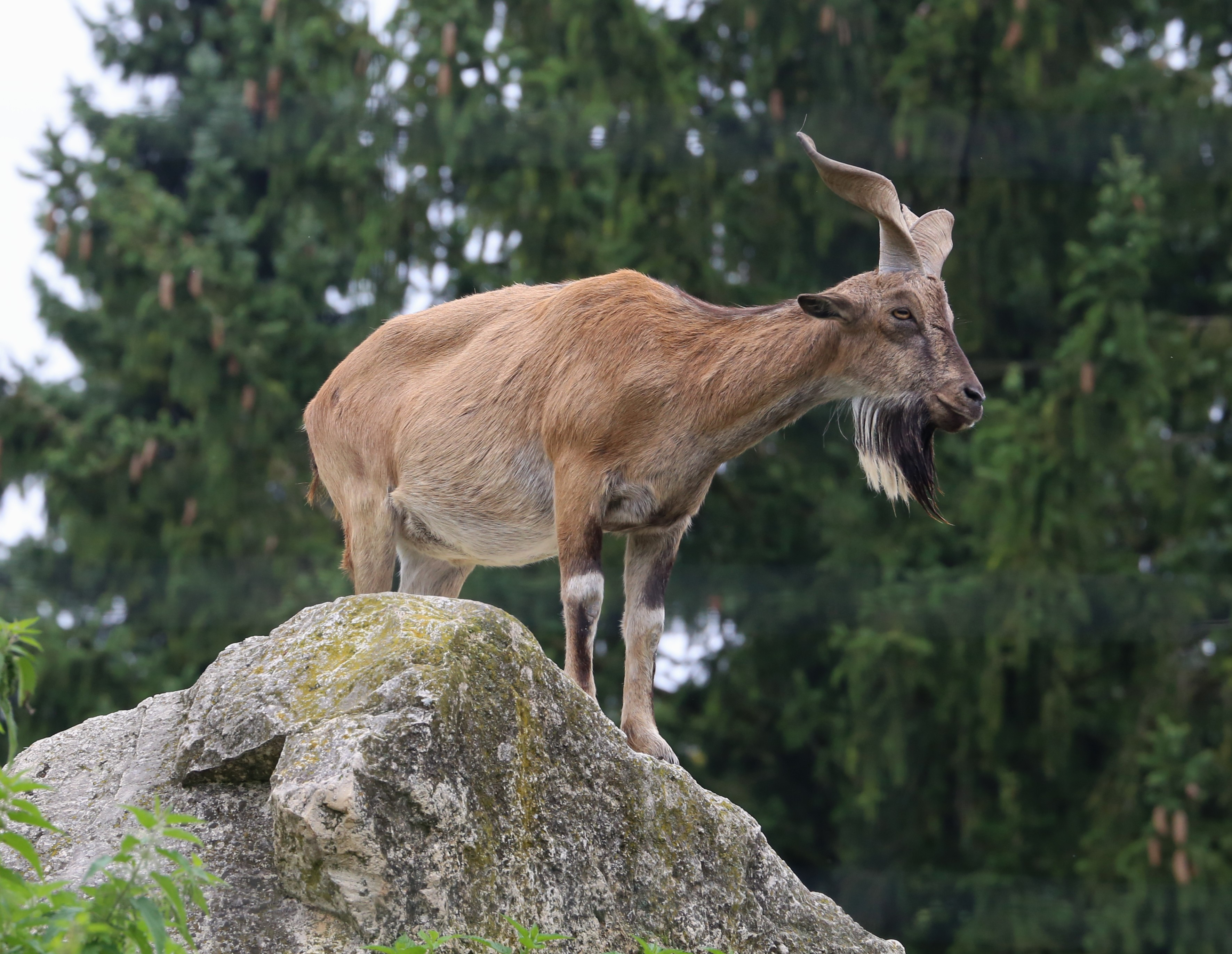 Markhor (Schraubenziege), Capra falconeri, Zoo Augsburg